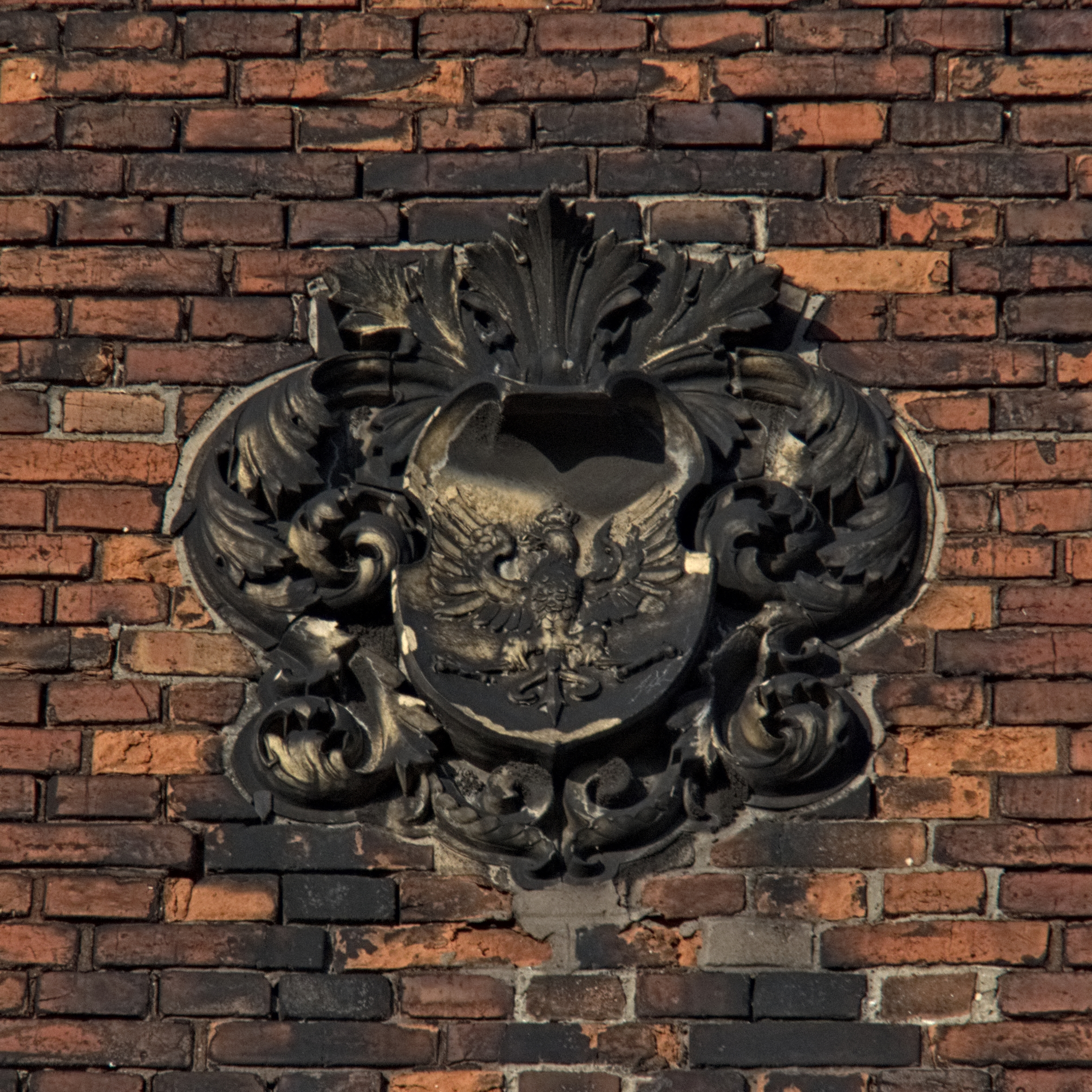 herb (orzełek) na fasadzie szkoły muzycznej w Bytomiu, ul. Stanisława Moniuszki 17, prawdopodobnie z XIX wieku